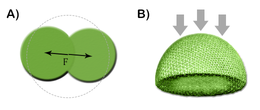 Representación de los varios tipos de modelos sin cuadrícula. A) Modelo basado en centro, mostrado en el caso en que dos células se dividen. B) Modelo de célula deformable.